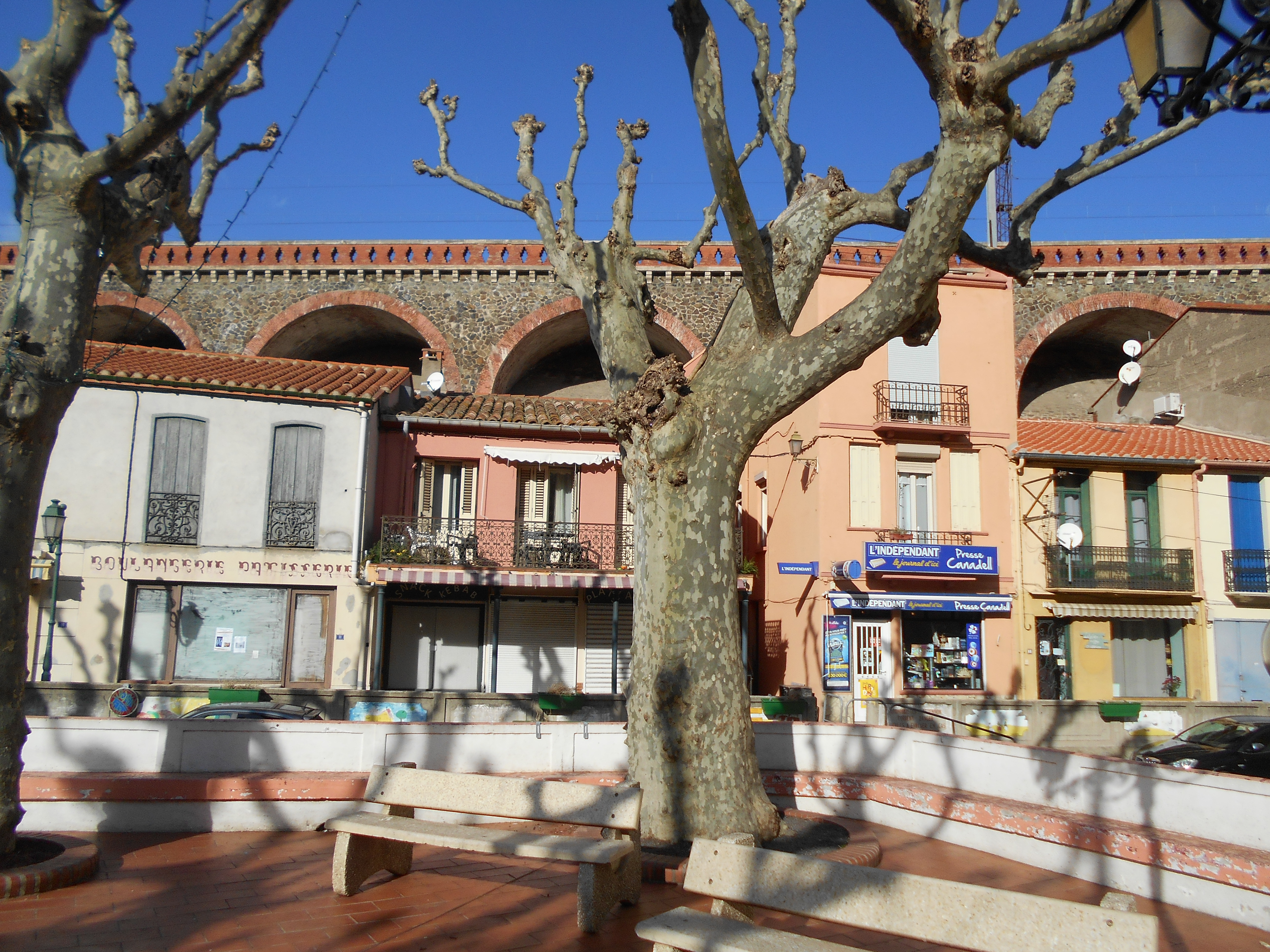 La plaça del poble vell de Cervera de la Marenda i, damunt seu, els arcs que sostenen l'extrem del terraplè de l'estació.